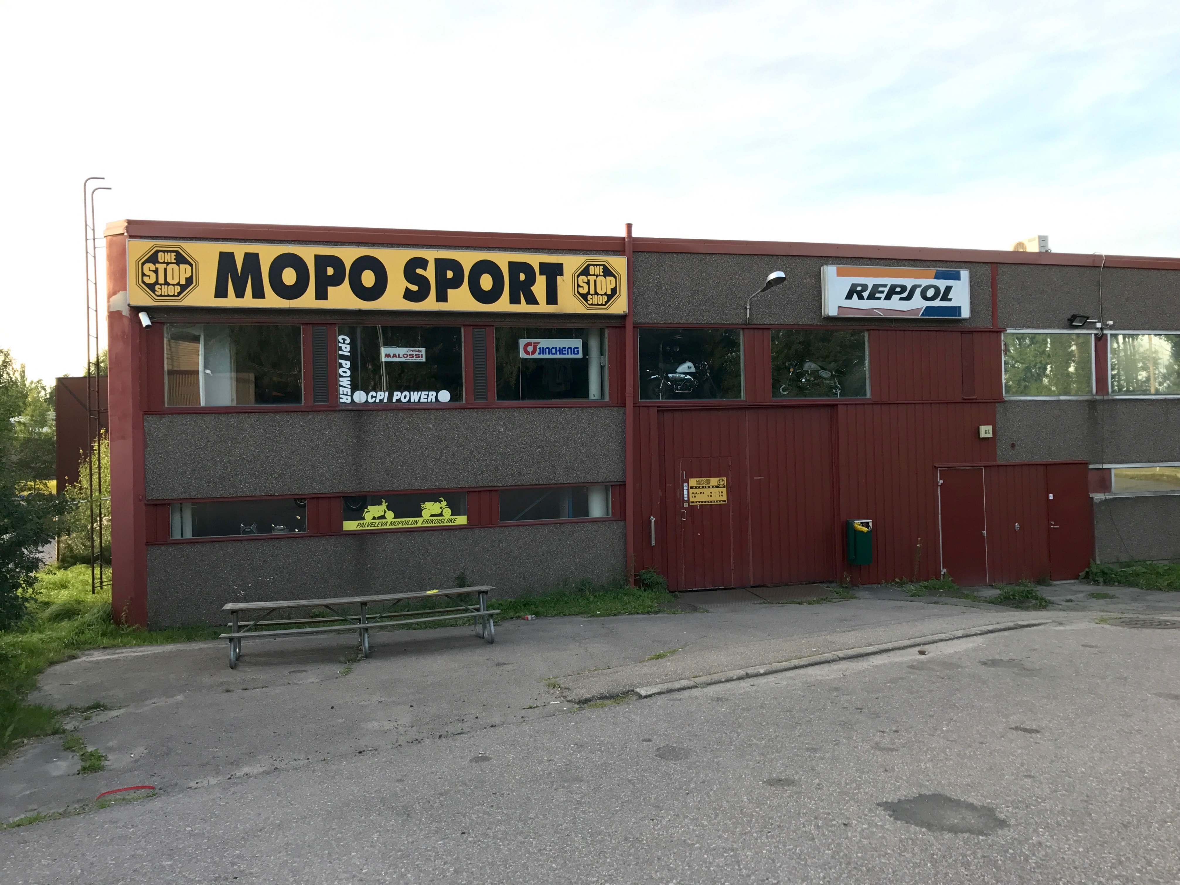 Mopo Sportin myymälä Vantaan Petikossa.